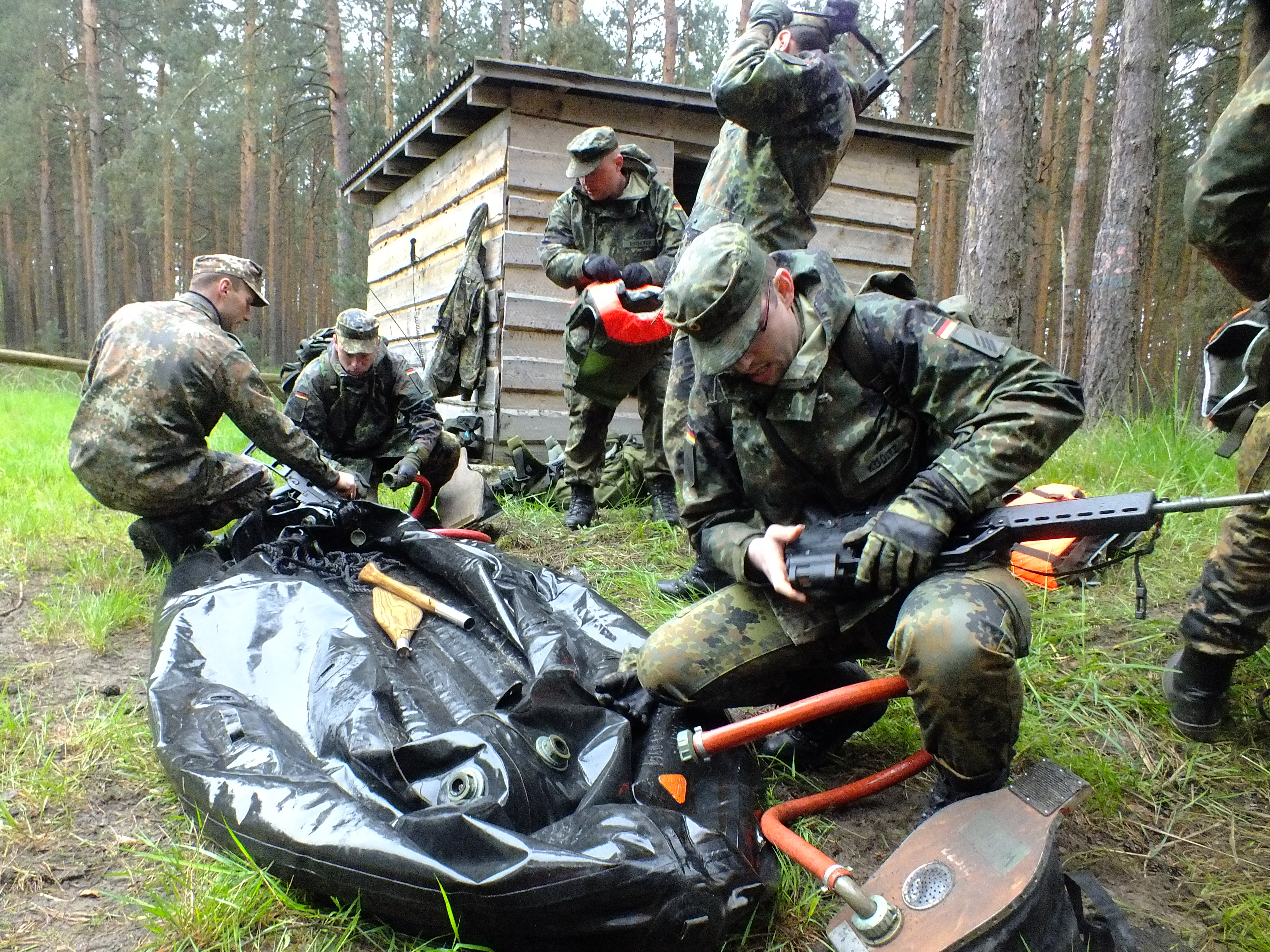 RSU Sachsen in Aktion